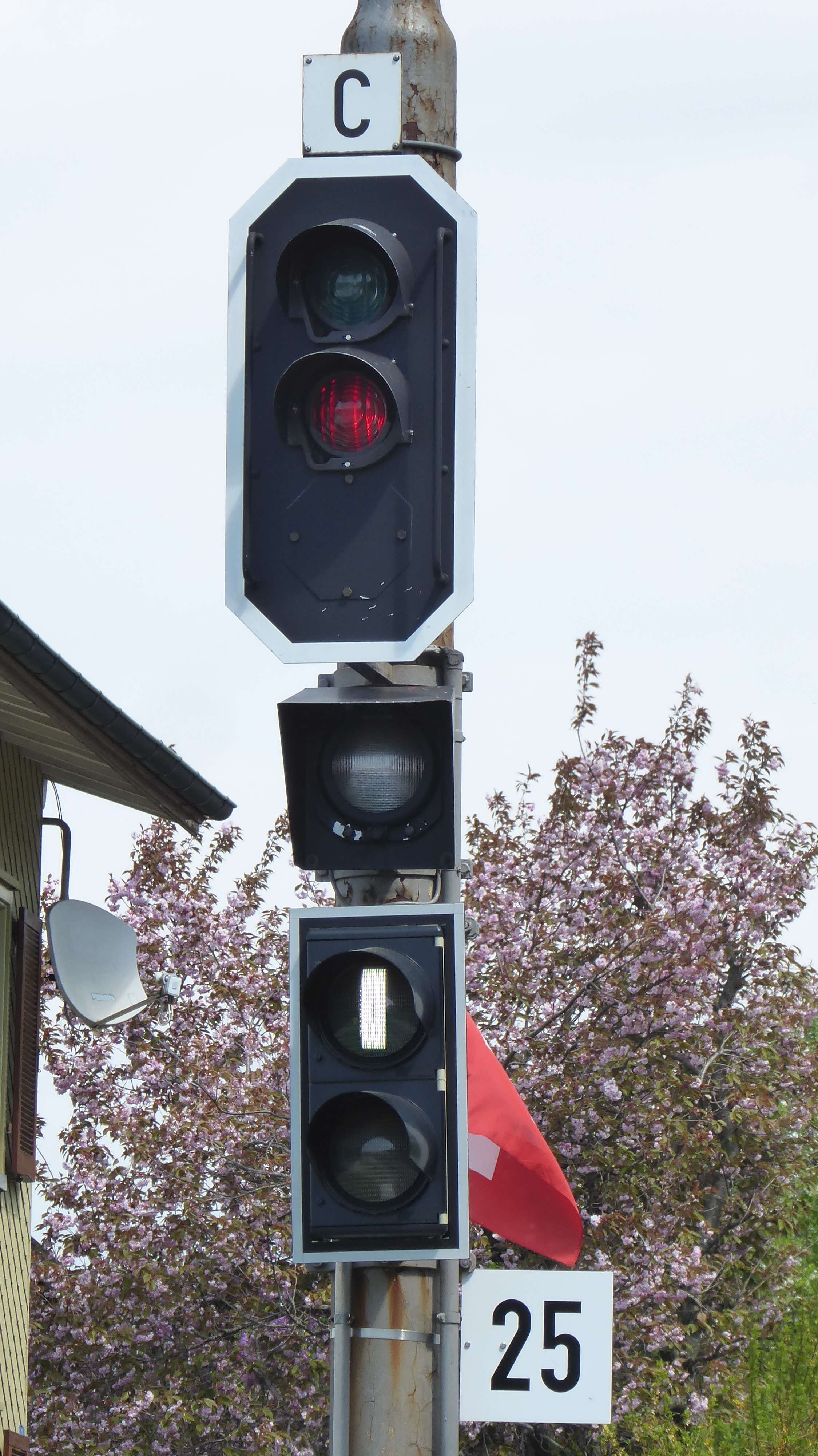 Ausfahrsignal der Appenzeller Bahnen in Vögelinsegg Richtung Speicher